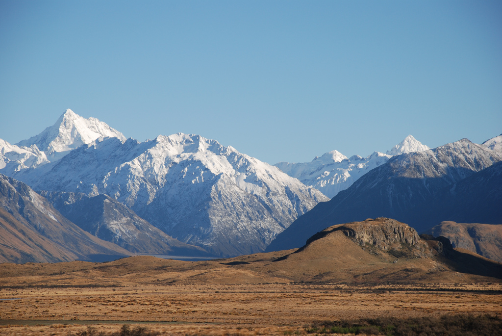 Mt. Sunday, localización de Edoras en la película El Señor de los Anillos.